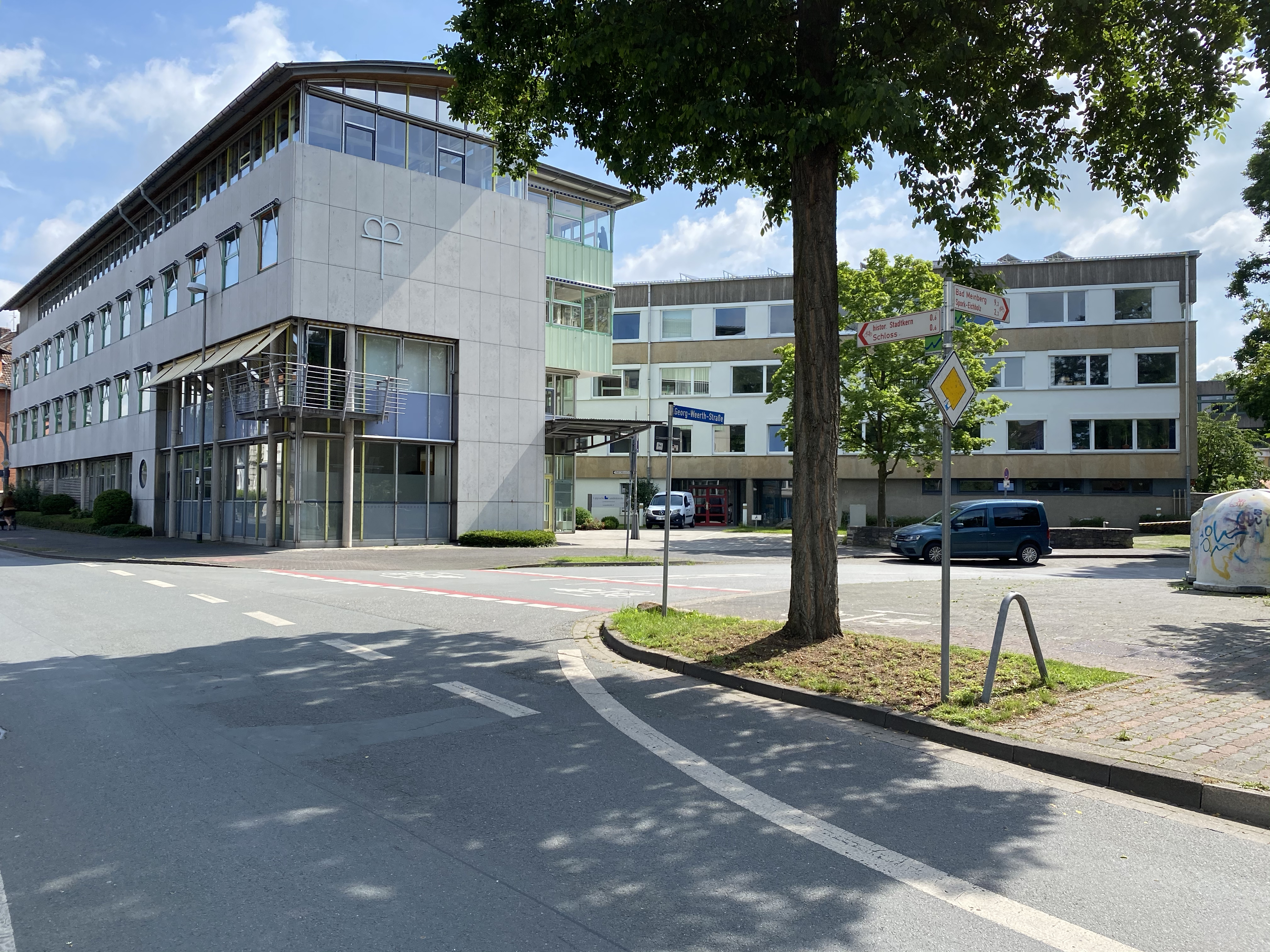 Blick von der Leopoldstraße auf das Landeskirchenamt der Lippischen Landeskirche Alt- und Neubau